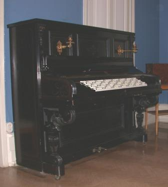 Piano med Jankó-klaviatur som har tilhørt Tekla Nathan Bjerke. Det er laget av A. H. Francke i Leipzig. Pianoet tilhører Norsk Folkemuseum (NF.1932-0204) og er stilt ut på Ringve Museum, Trondheim.